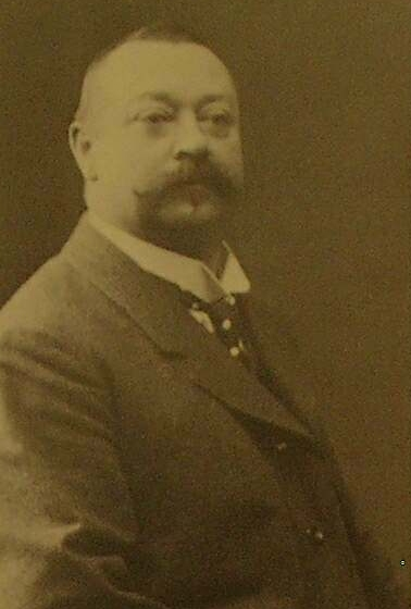 Maler und Kunstprofessor Carl Küstner (Deutschland)